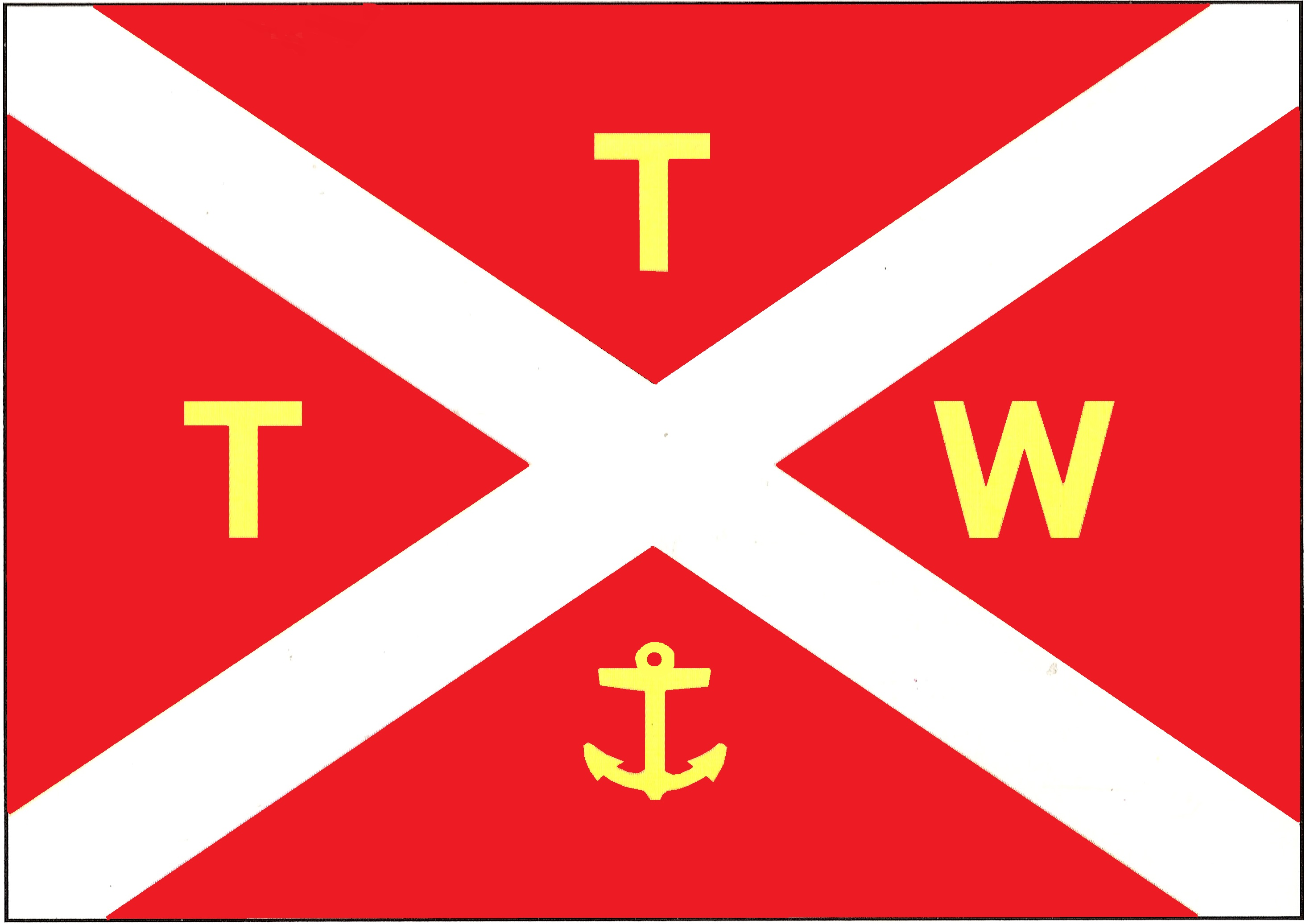 Tomaszowskie Towarzystwo Wioślarzy - bandera